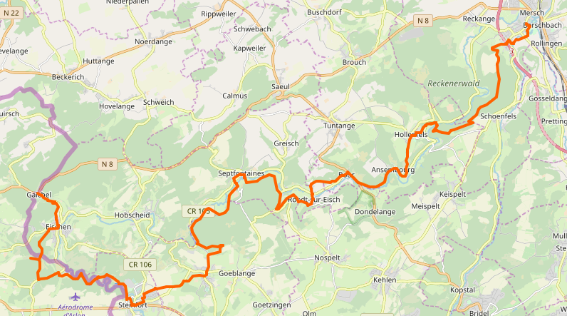 Tracé du Sentier pédestre national de la vallée des sept châteaux